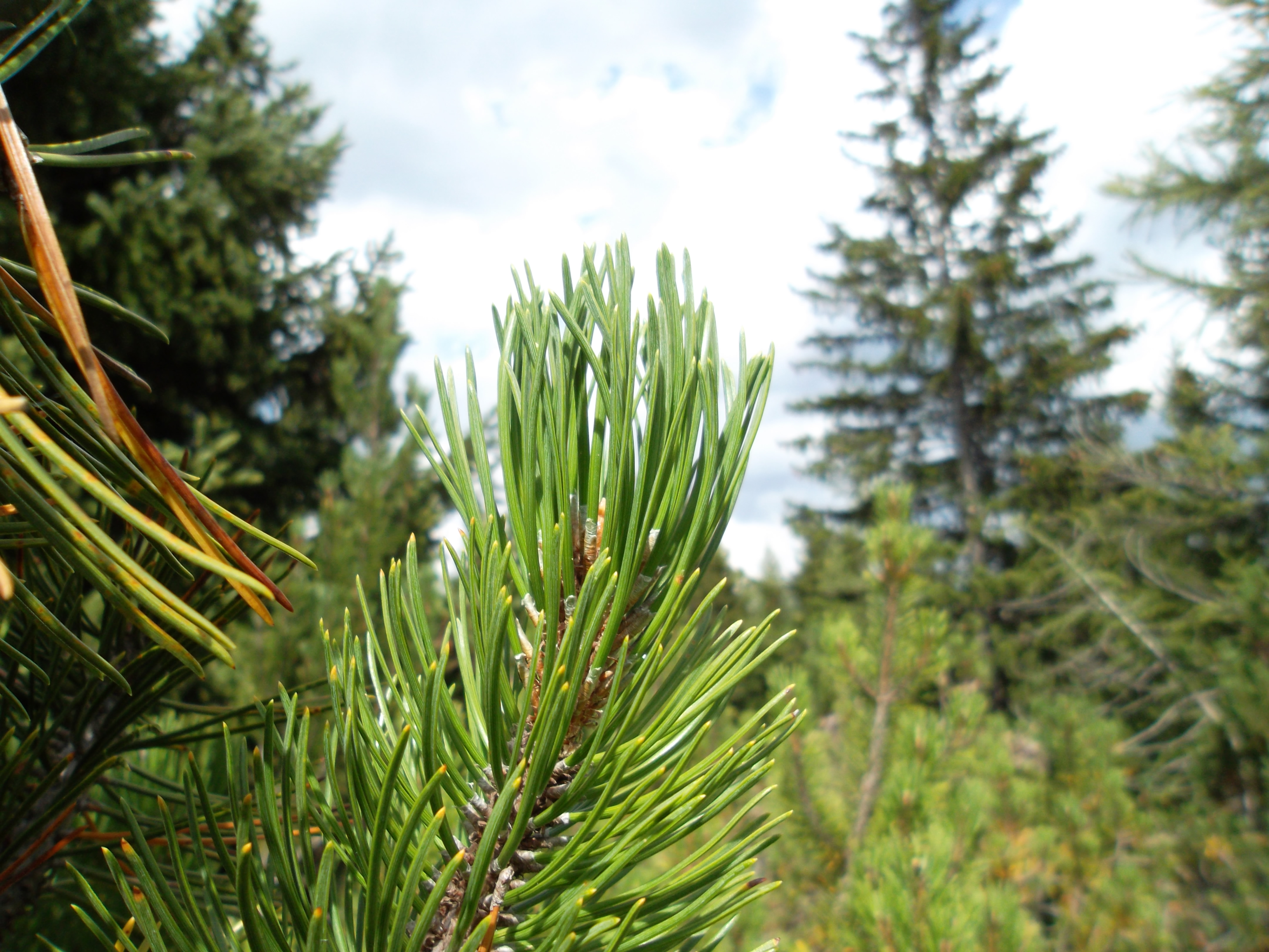 Pino Mugo